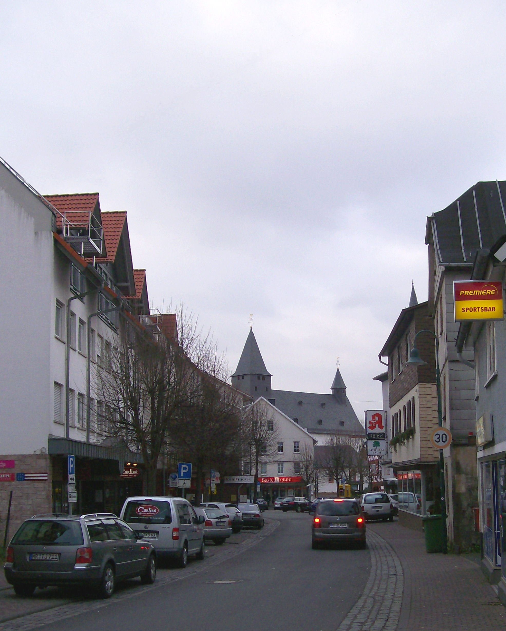 Gladenbach